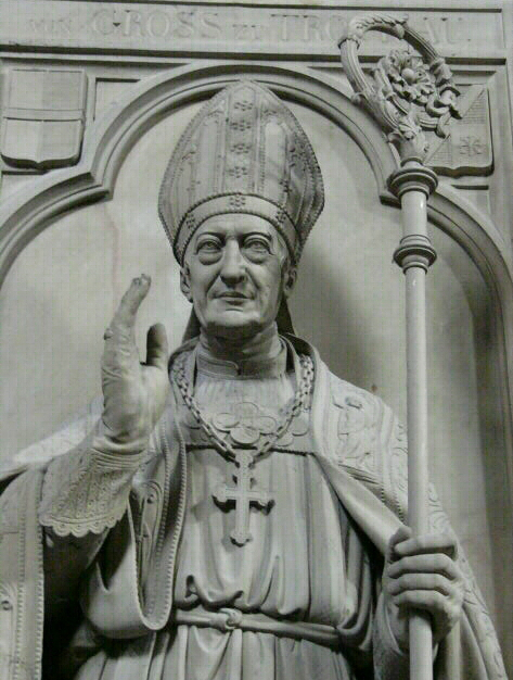 Darstellung des Bischofs Adam Friedrich Groß zu Trockau auf seinem Epitaph im Würzburger Dom